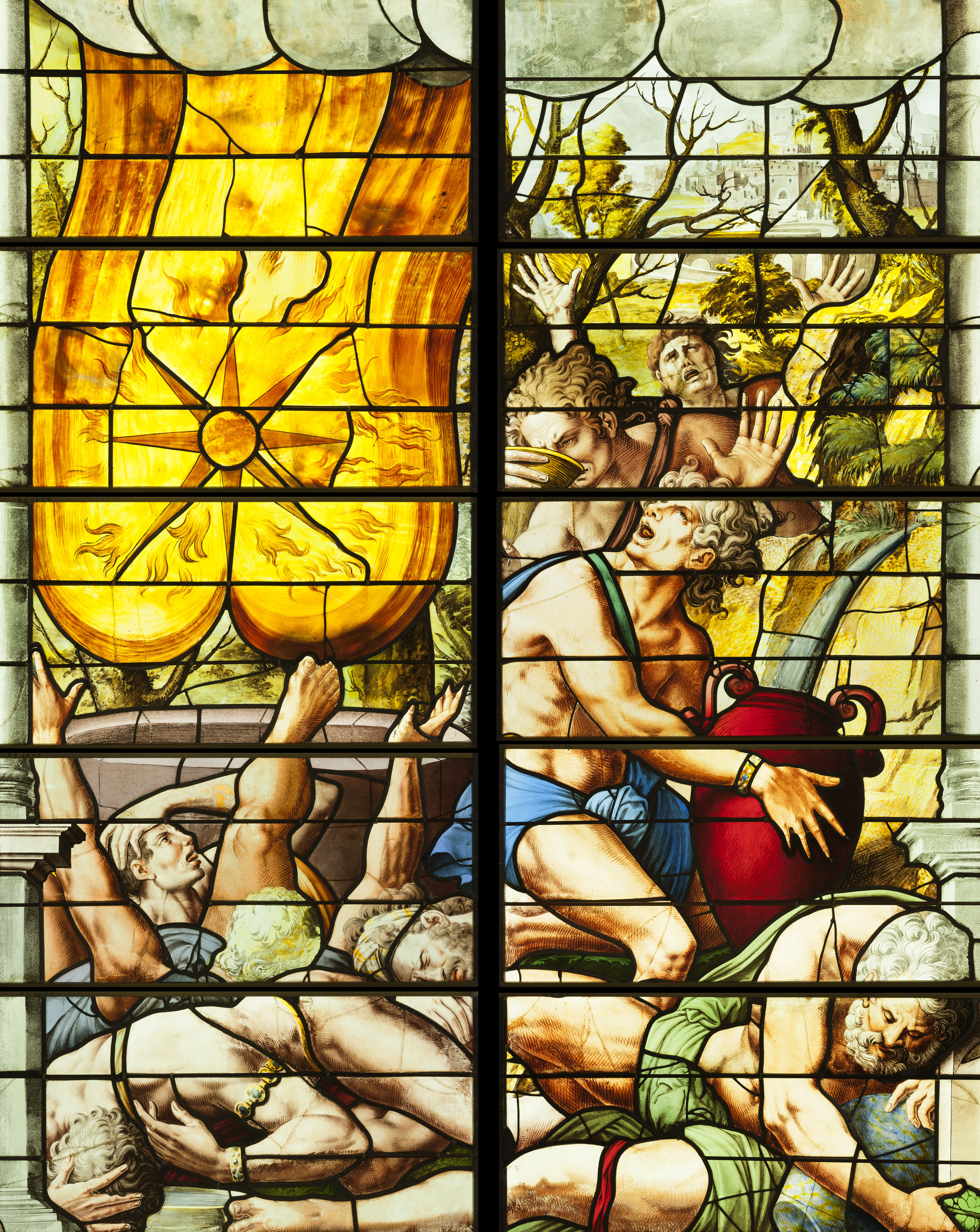 Montage présentant un détail du registre supérieur de la baie 1 de l'abside.